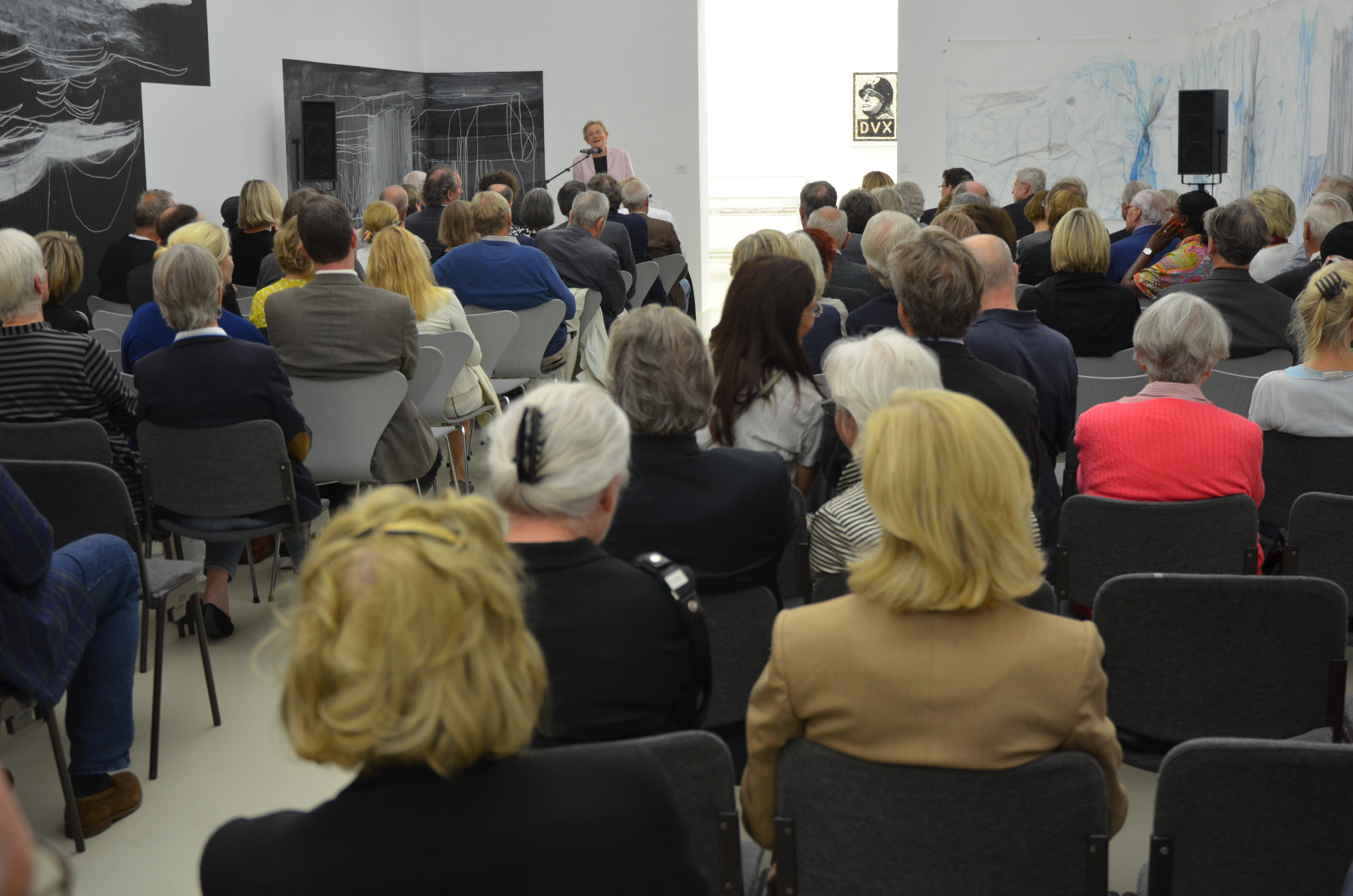 Zur Eröffnung der 88. Herbstausstellung niedersächsischer Künstlerinnen und Künstler im Künstlerhaus Hannover wurde am 27. August 2018 auch der mit 10.000 Euro dotierte Kunstpreis der Sparkasse Hannover vergeben. Preisträger 2018 war der Künstler Dieter Froelich ...